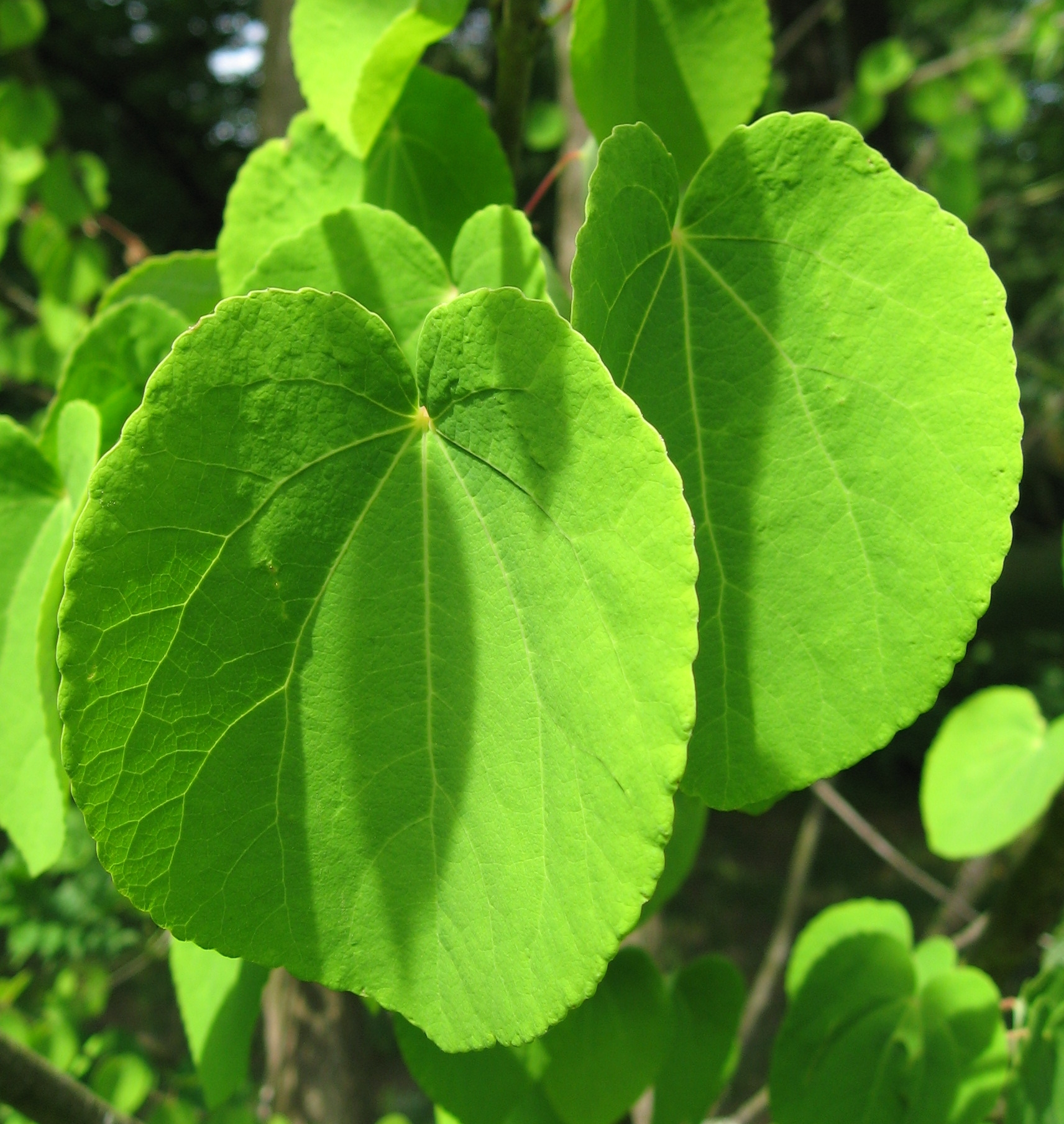 Cercidiphyllum japonicum in Jardin de l'ile verte